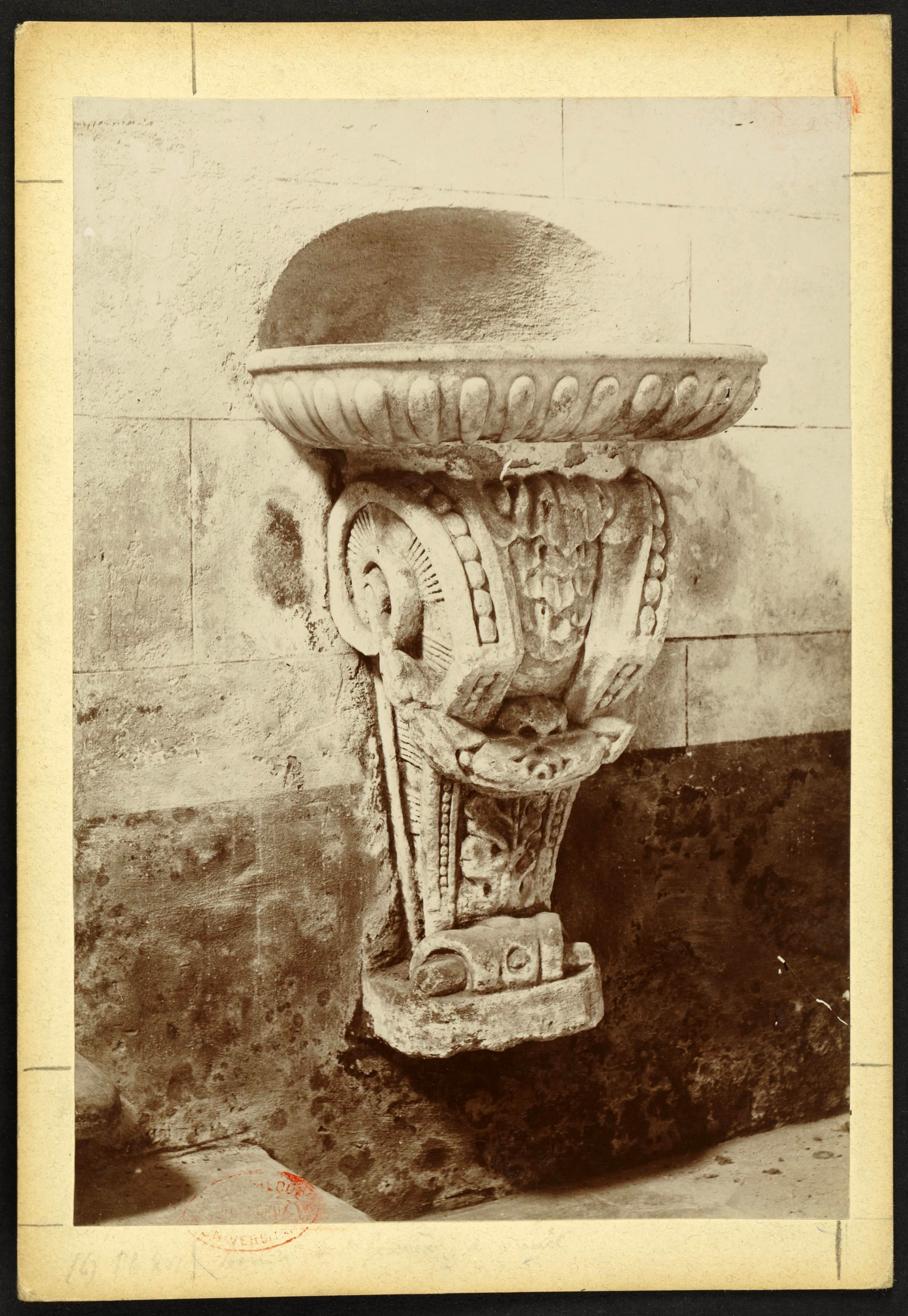 Saint-Genès-de-Fronsac église St Barthélemy